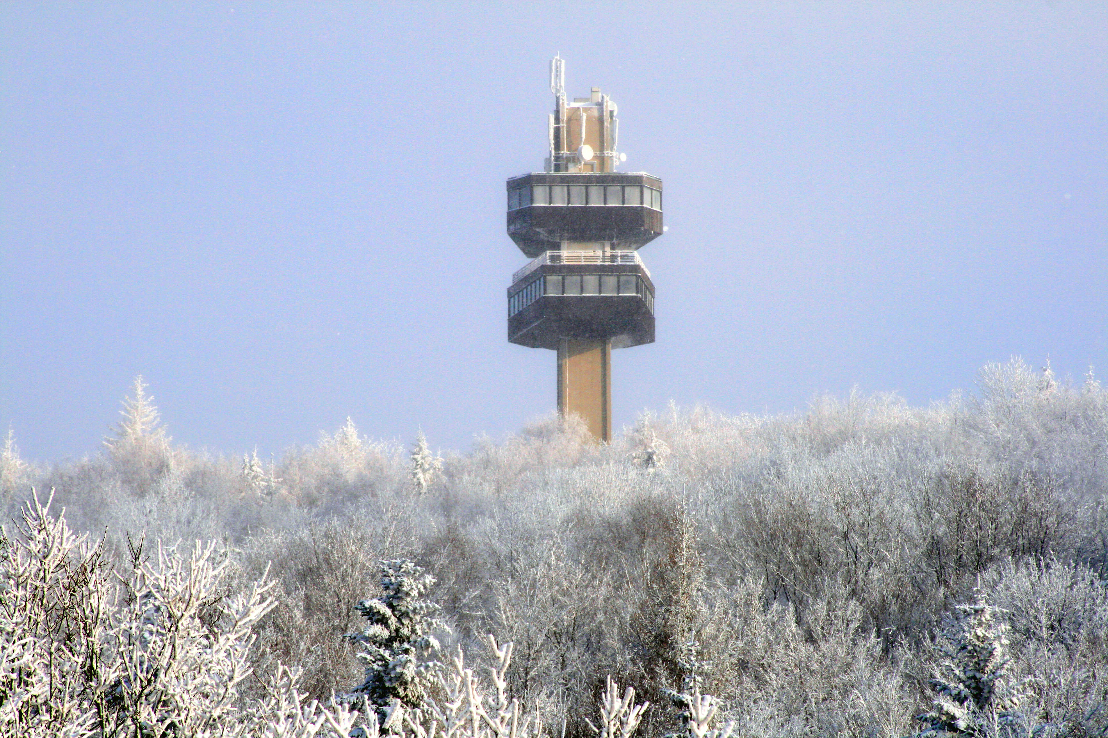 Nová pozorovateľňa bola vybudovaná v 70. rokoch na mieste pozorovatňe veliteľa 1.čsaz gen. L. Svobodu v čase KDO